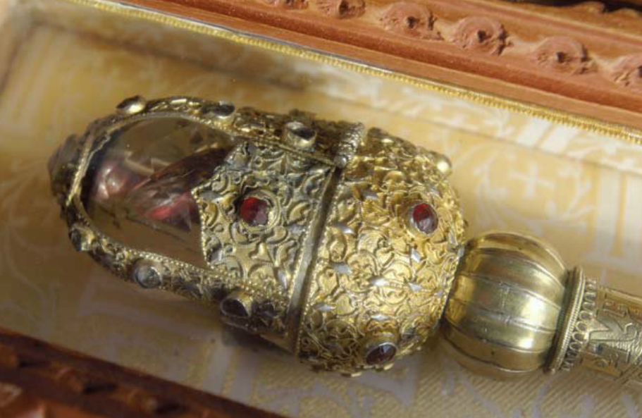 Српски (ћирилица): Штап Светог Саве, у манастиру Света Тројица - Пљевља. Srpski (latinica): Štap Svetog Save, u manastiru Sveta Trojica - Pljevlja.